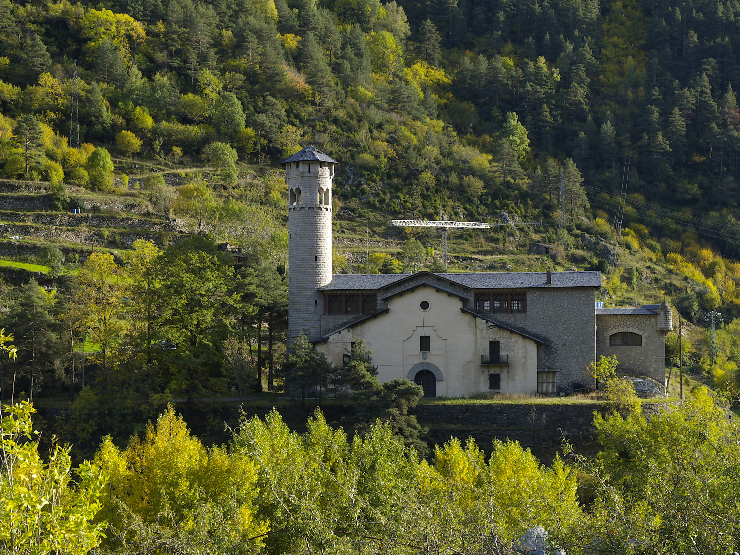 Emisor de Radio Andorra de Encamp